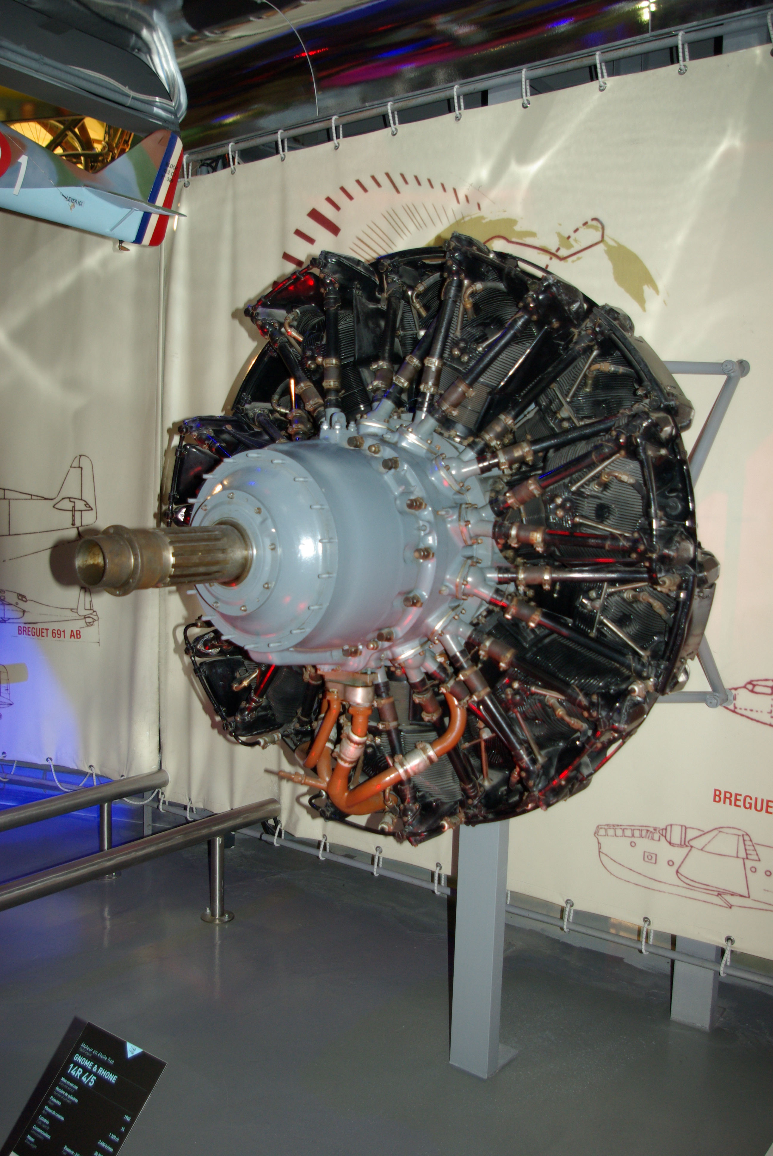 Gnome et Rhône 14R 04/05 présenté au musée Safran.